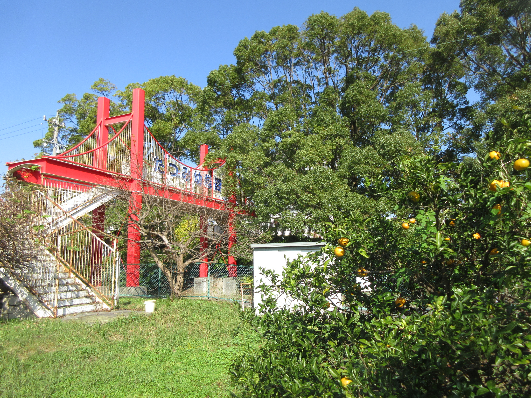 たつみ幼稚園（岡崎市緑丘）